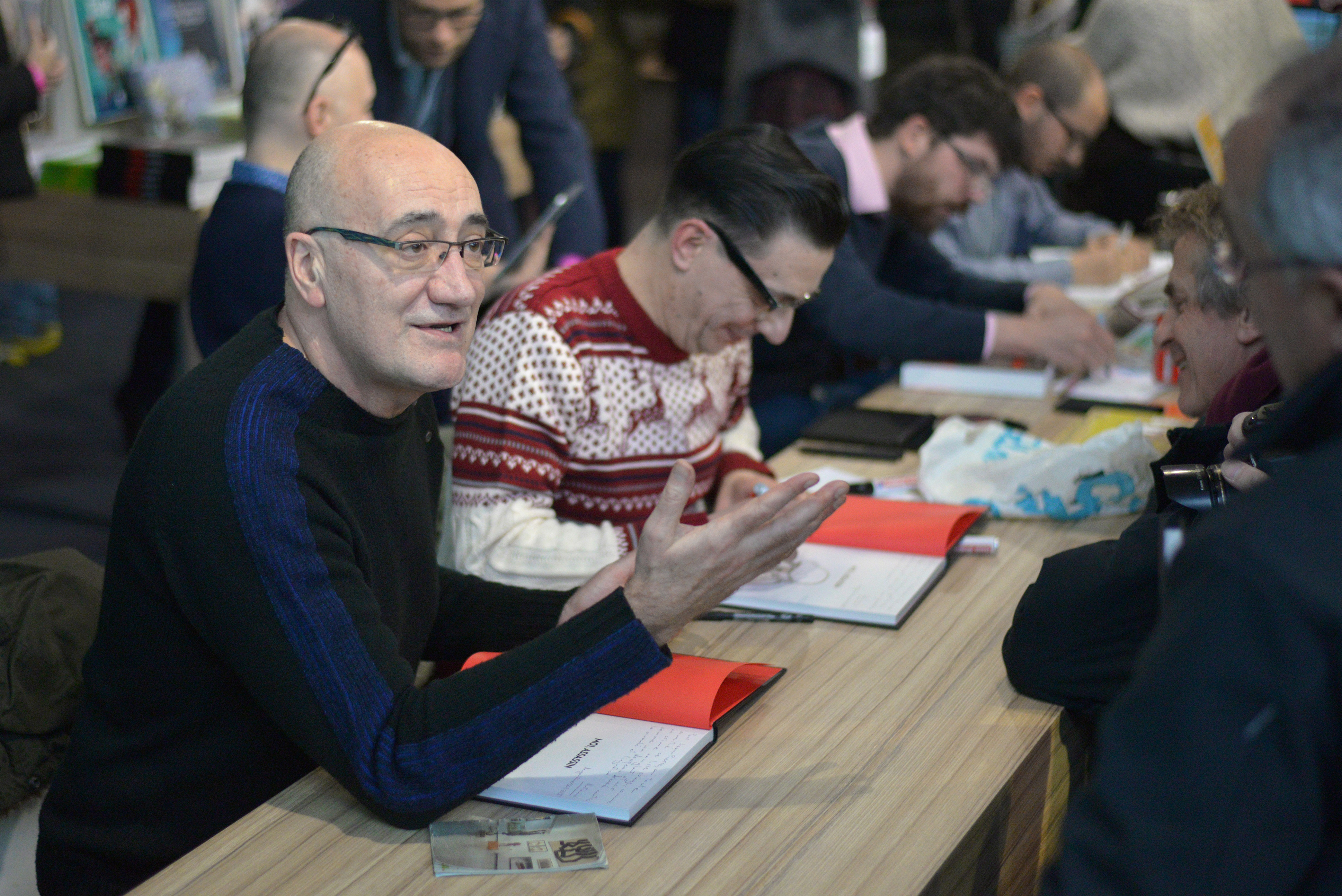 L'écrivain espagnol Antonio Altarriba en séance de dédicaces au stand Gallimard du Festival International de la BD d'Angoulême, 30 janvier 2015.